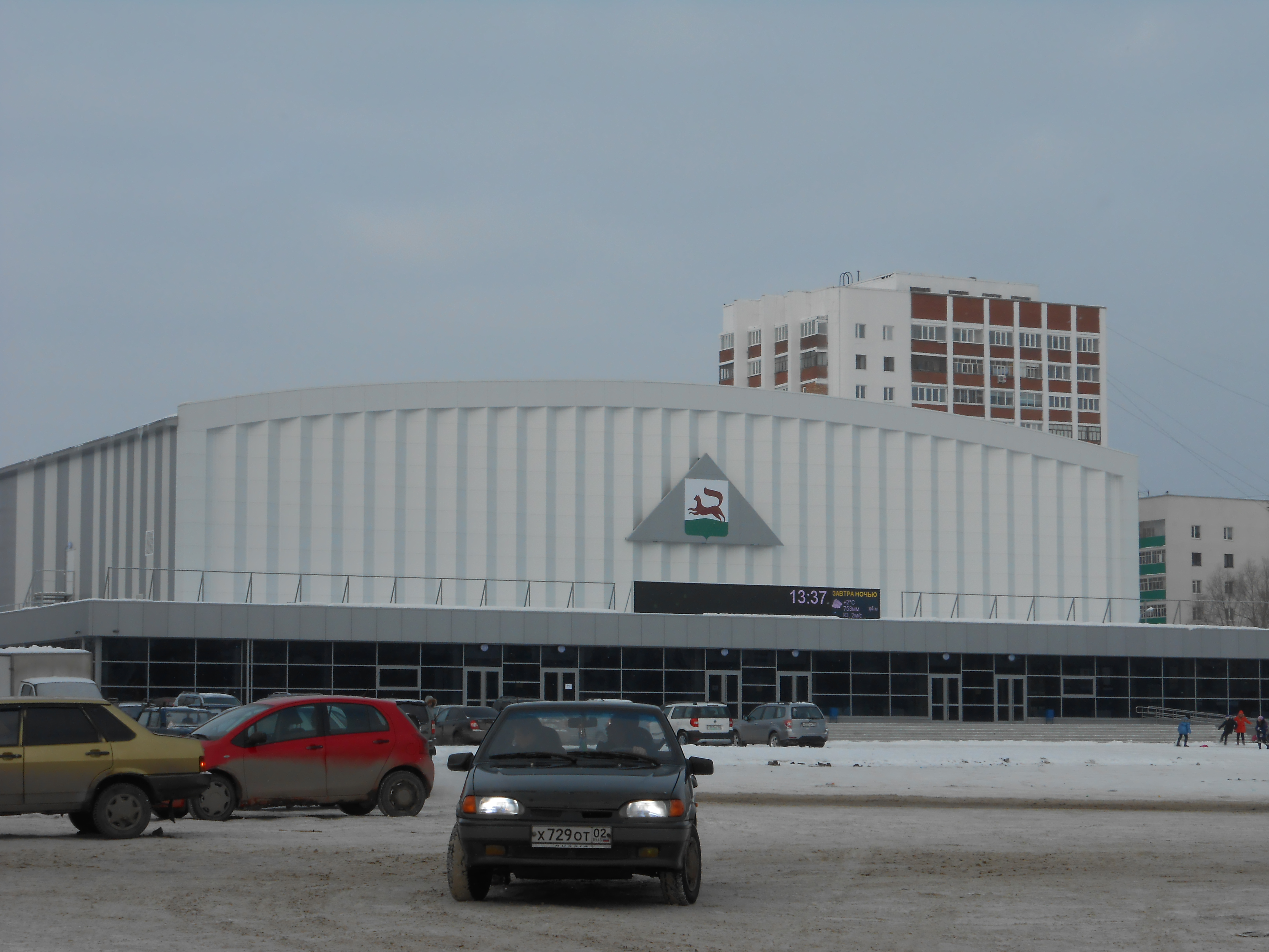 Дворец Спорта в городе Уфа после реконструкции.